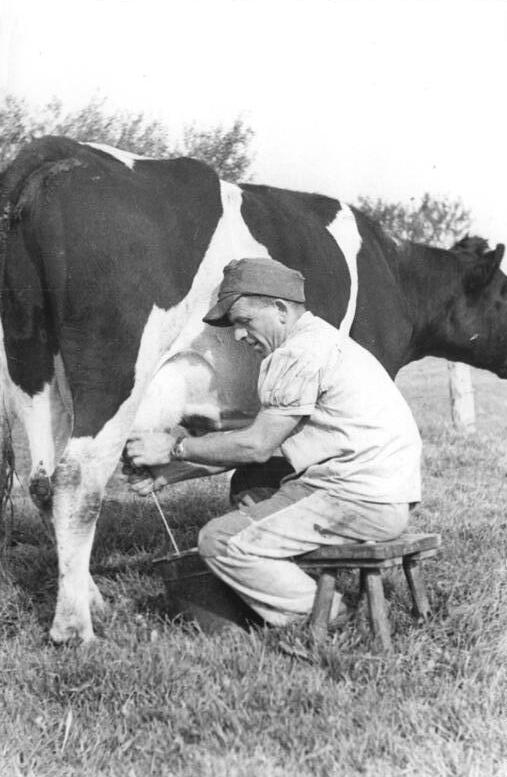 Bauer beim Melken Zentralbild Kümpfel 15.12.50 Milcherzeugung und Milchkontrolle. Unser Bild zeigt, wie Milch in einer Molkerei der Volkseigenen Güter Berlins für die Verwendung als keimfreies, einwandfreies Nahrungsmittel behandelt wird. "Fachgemässes Melken auf der Weide".